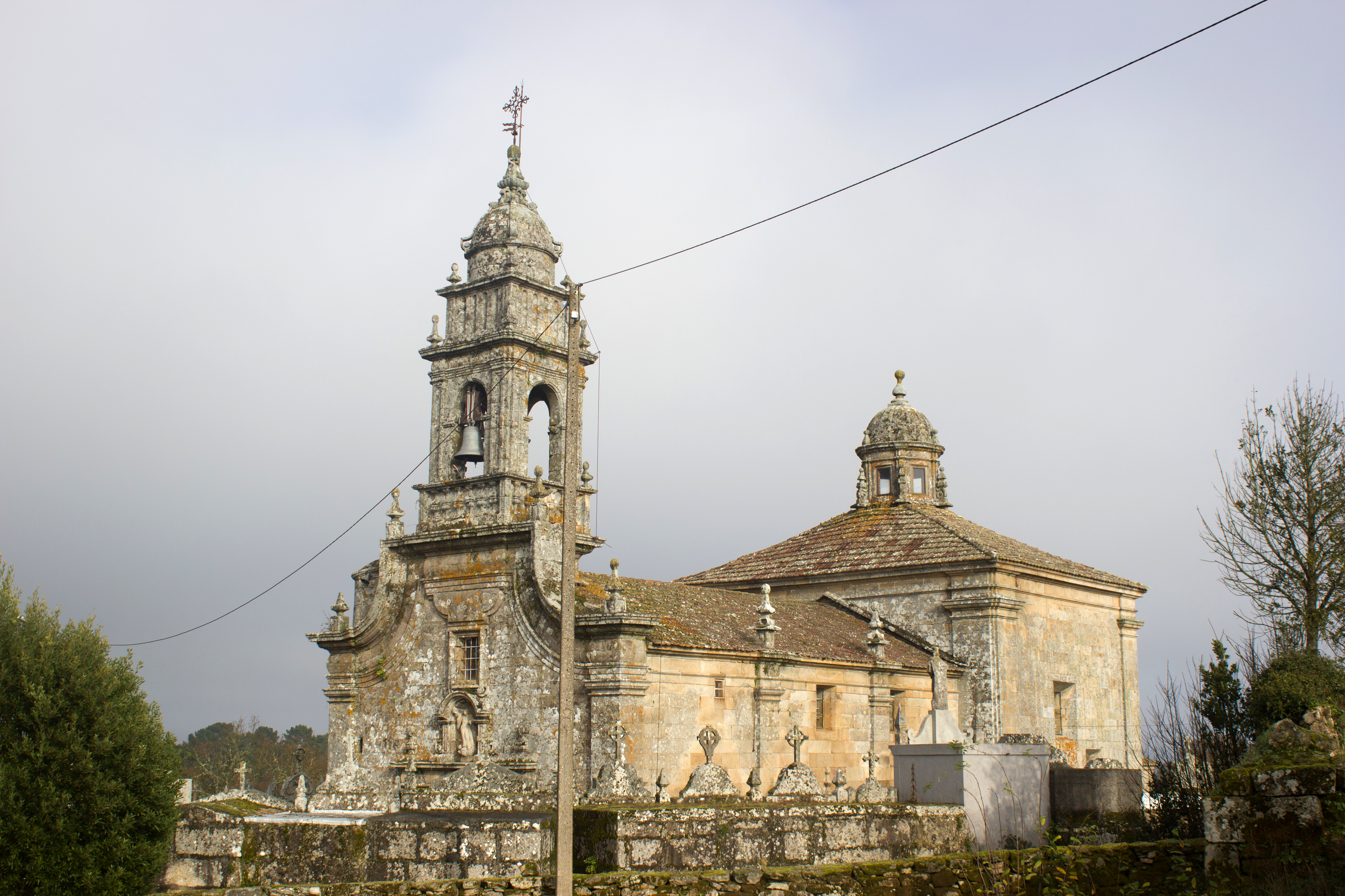 Igrexa de Santa María de Salamonde, no concello de San Amaro.